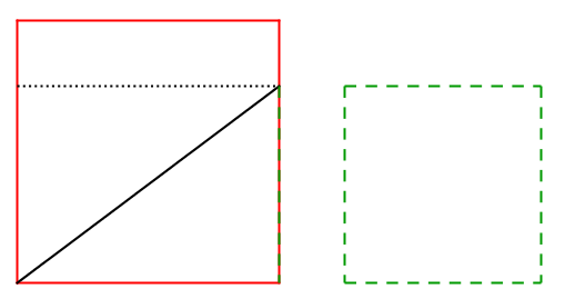 Illustration de la construction d'un carré d'aire égale à la somme des aires de deux autres carrés selon une méthode décrite dans les Sulba-Sutras.